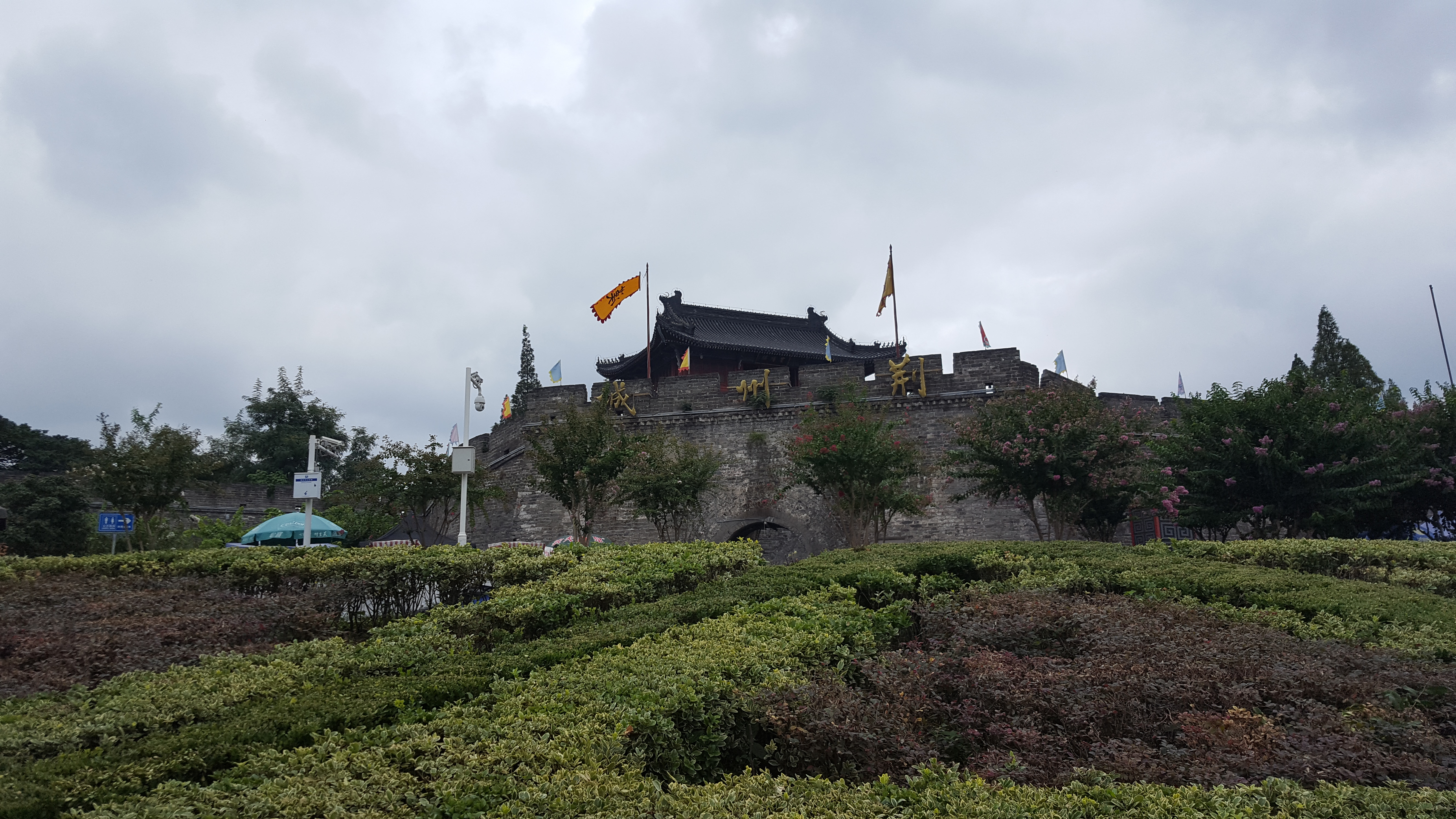 荆州东门古城墙